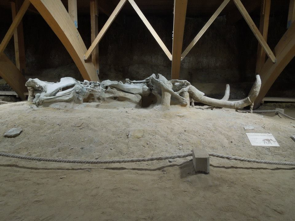 Mamut izložen u Viminaciumu.